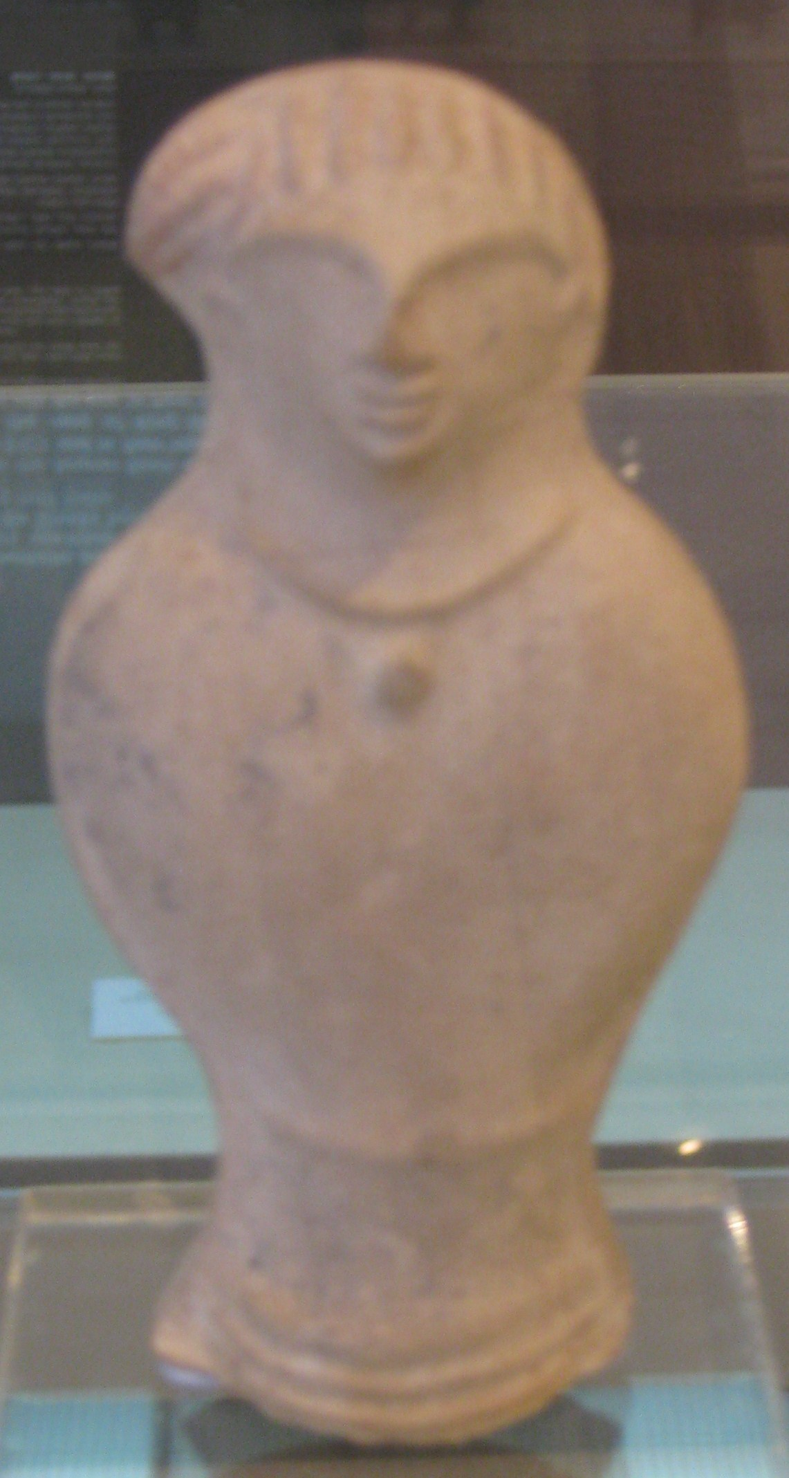 National Maritime Museum, Israel - Terracotta Figurines המוזיאון הימי הלאומי בחיפה צלמית נער, "טיפוס בית נטיף", פלג גופו העליון מתואר בצורה סכימטית בלא התייחסות לפרטים אנטומיים, את הצוואר מקשט ענק עם מדליון, תקופה רומית מאוחרת סוף המאה ה-3 תחילת המאה ה-4 לספירה